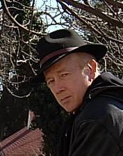 Ryan Allen's photo